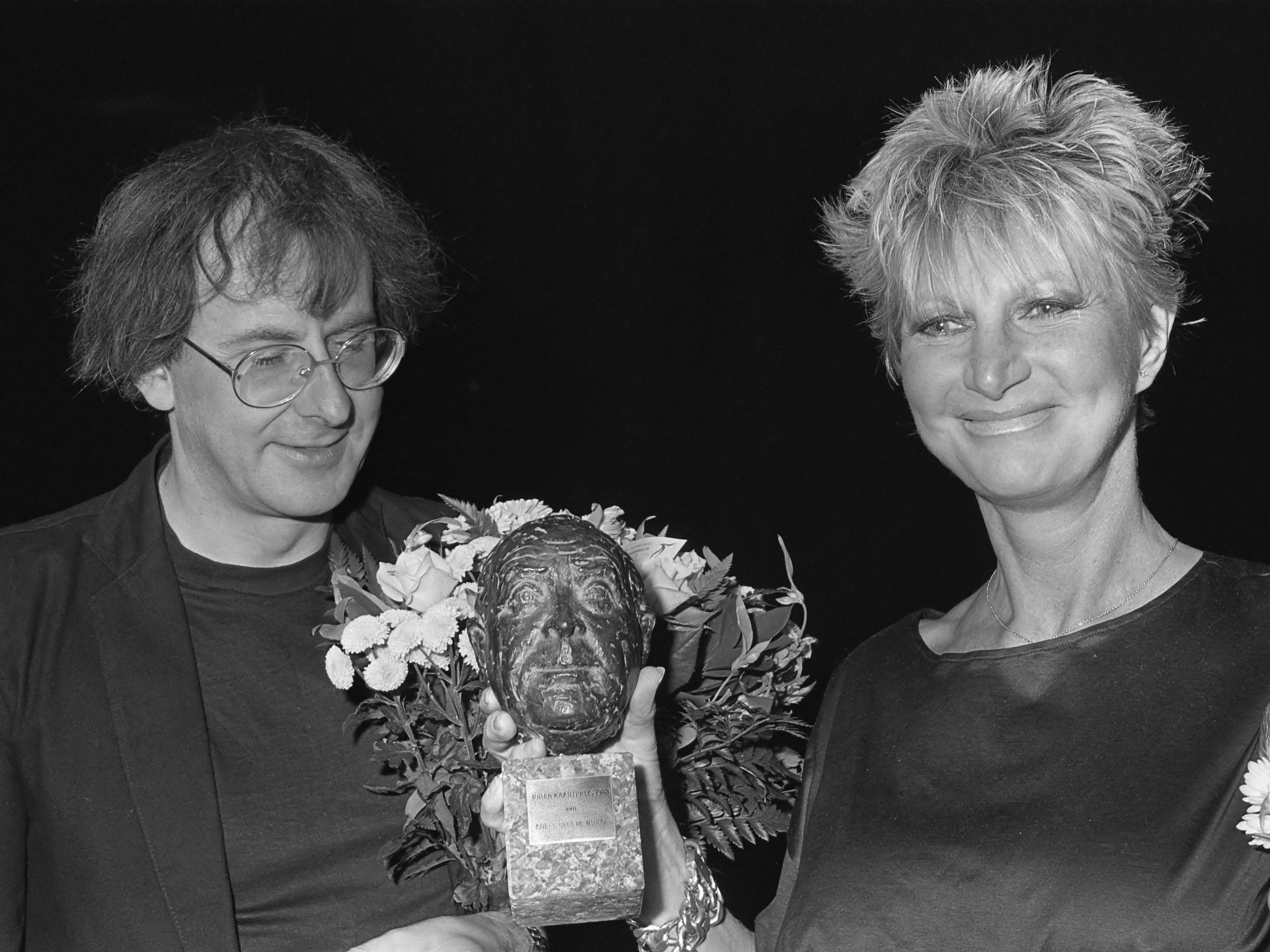 Adèle Bloemendaal en begeleider Frans Ehlhart 24 oktober 1983